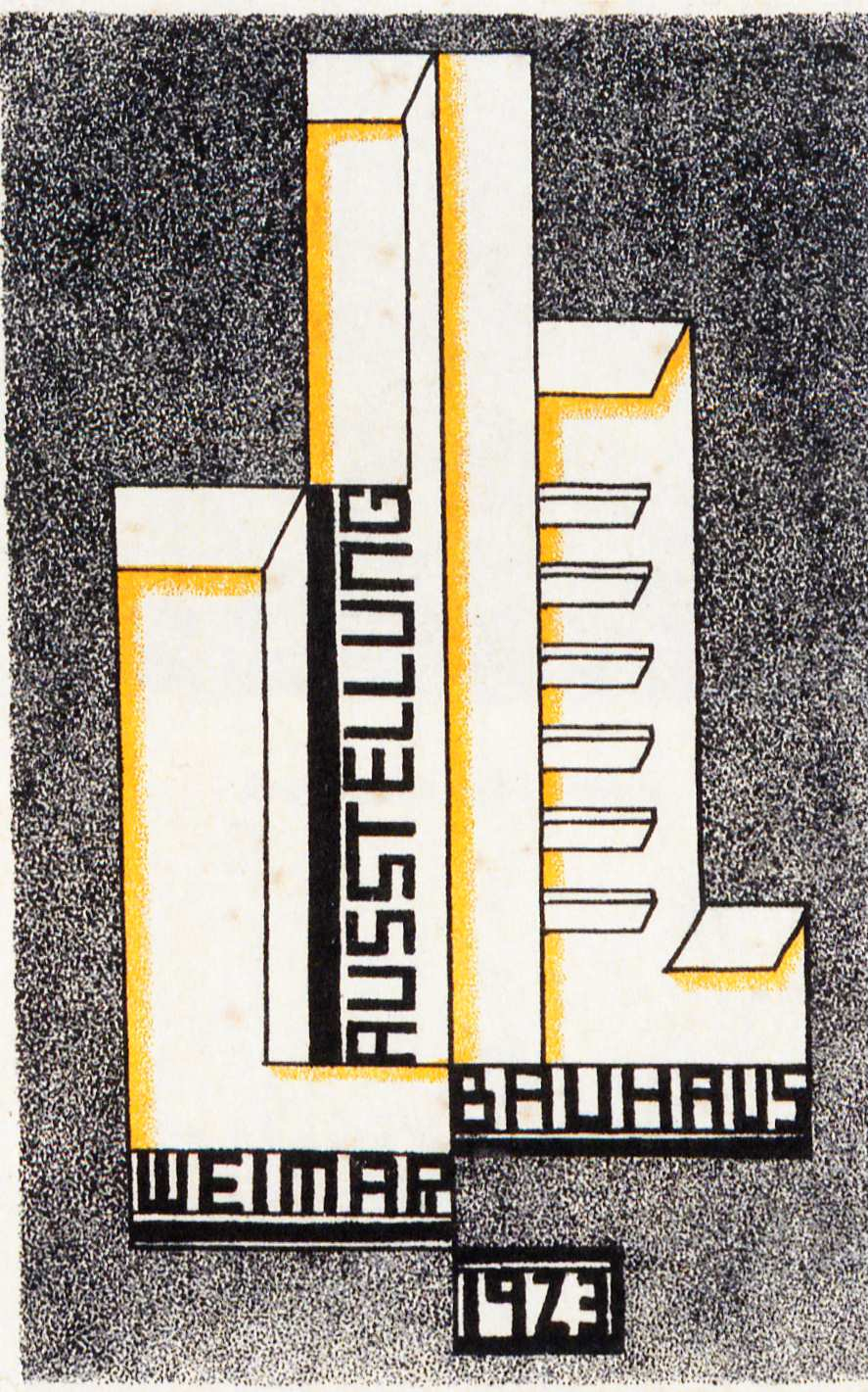 Farkas Molnár Bauhausausstellung 1923 Farblithographie